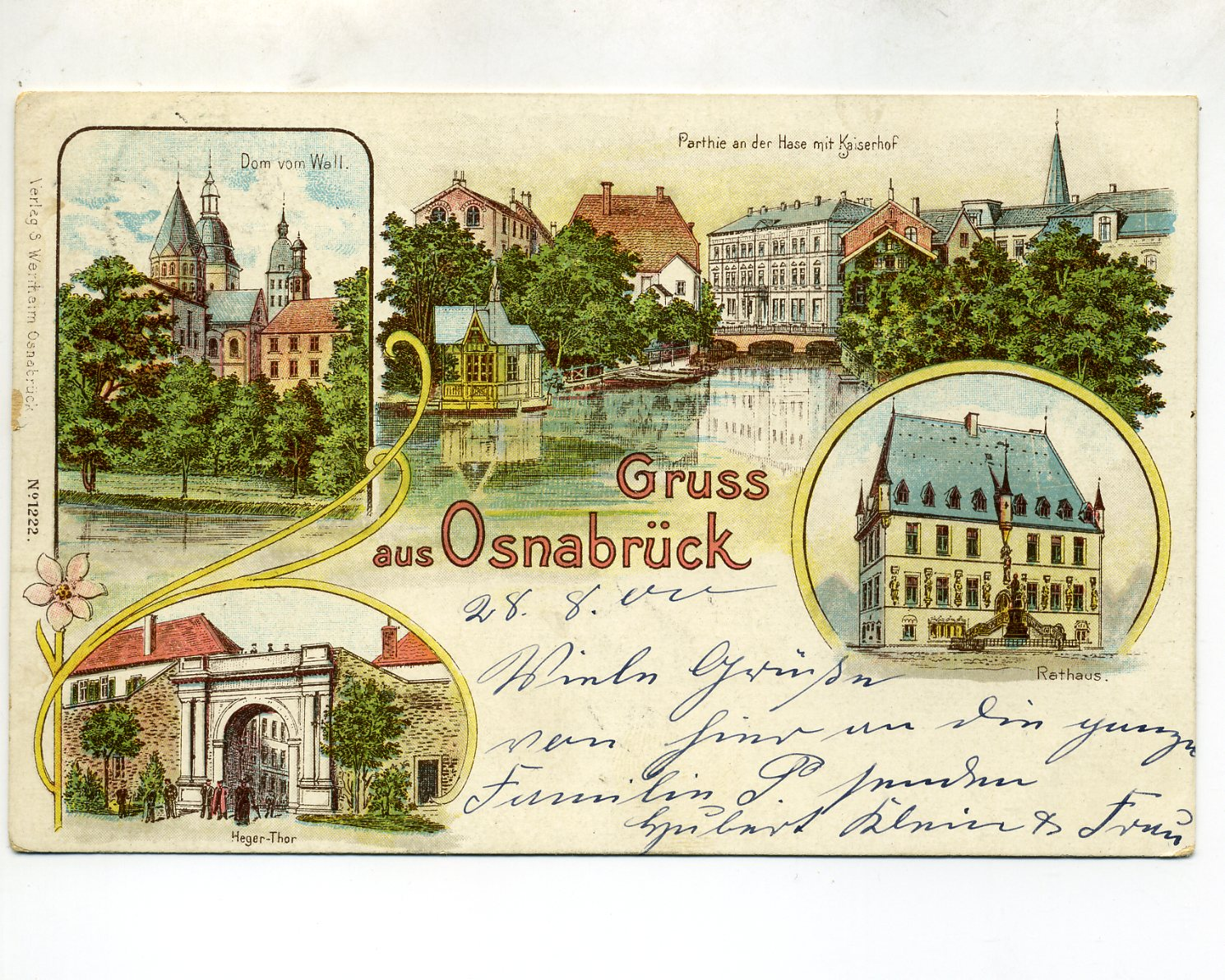 Gruss aus Osnabrück - 1900 Dom vom Wall - Parthie an der Haze mit Kaiserhof - Rathaus - Heger -Tor